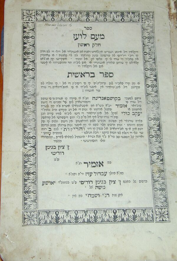 שער הכרך הראשון של מעם לועז, איזמיר, 1864.